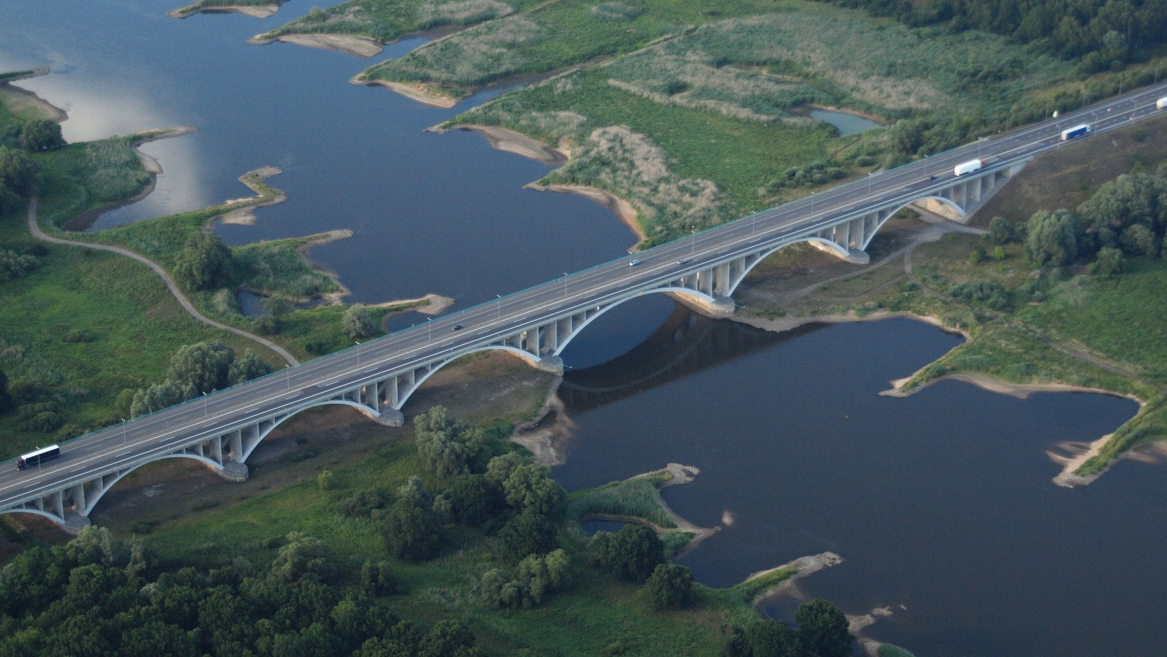 Oderbrücke Frankfurt (A 12), Luftaufnahme (2015)